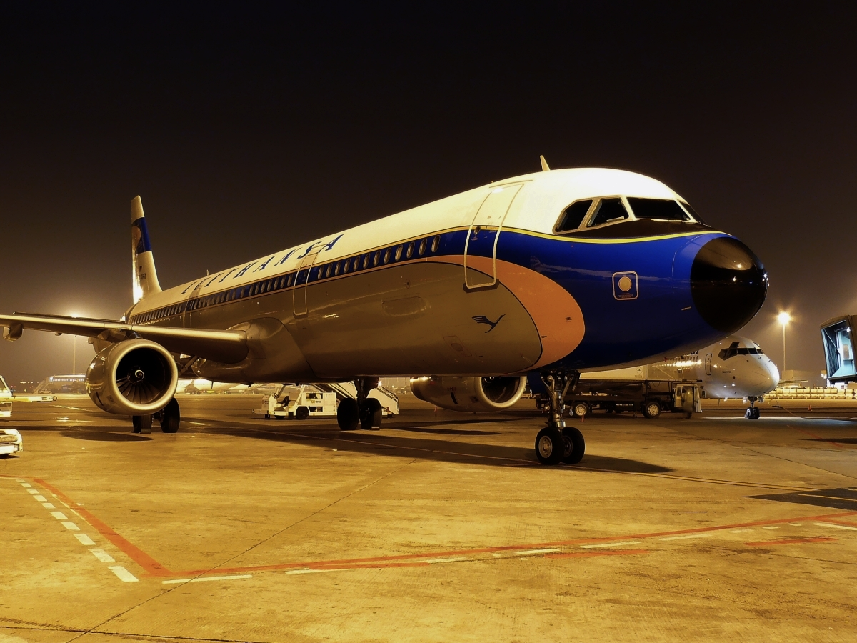 Airbus A321-131 D-AIRX cn 887. Bautizado como "Weimar· Entregado a Lufthansa en Octubre de 1998. BCN / LEBL 2008 Febrero 23